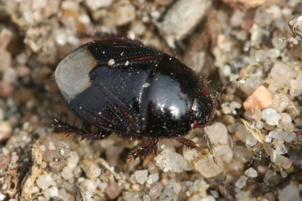 Microporus nigrita am 1. April 2017 in der Schwetzinger Hardt